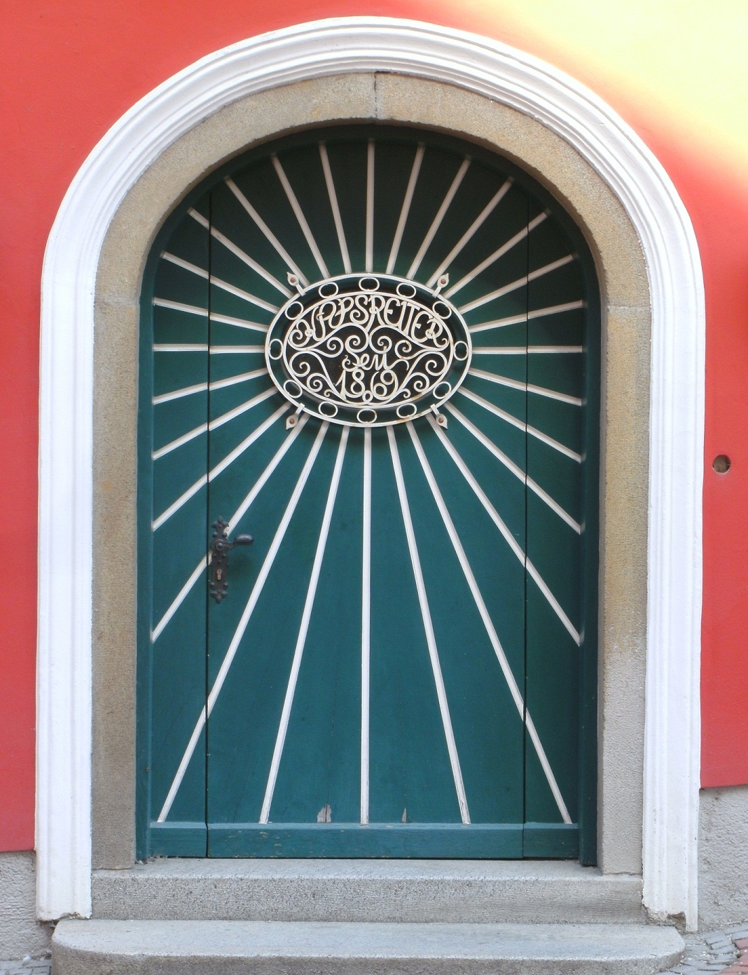 Eingang zur ehemaligen Konzernzentrale der Kapsreiter-Gruppe am unteren Stadtplatz Schärding mit dem Firmennamen am Portal